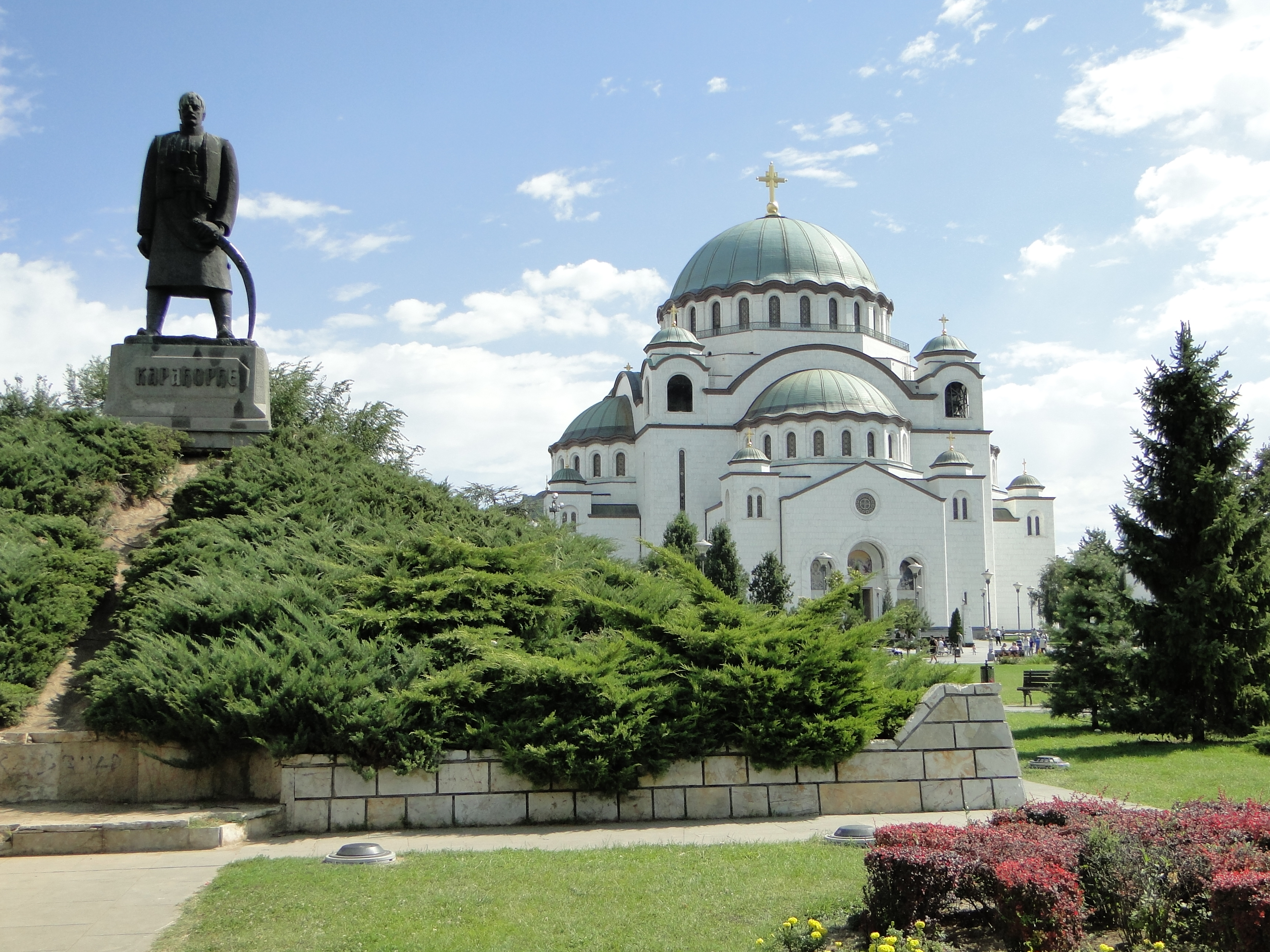 Beograd 2013 - Храм Светог Саве, Београд (Cathedral of Saint Sava)